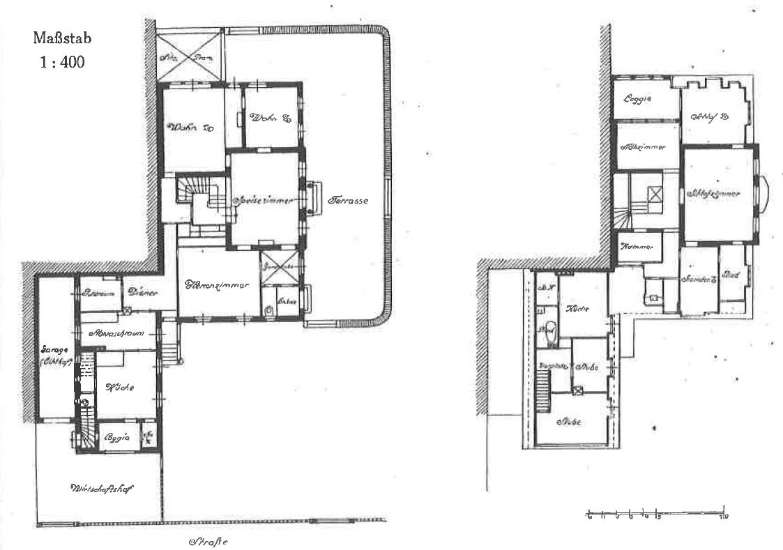 Wohnhaus Bleichröder, Grundriss, Entwurf Max Landsberg